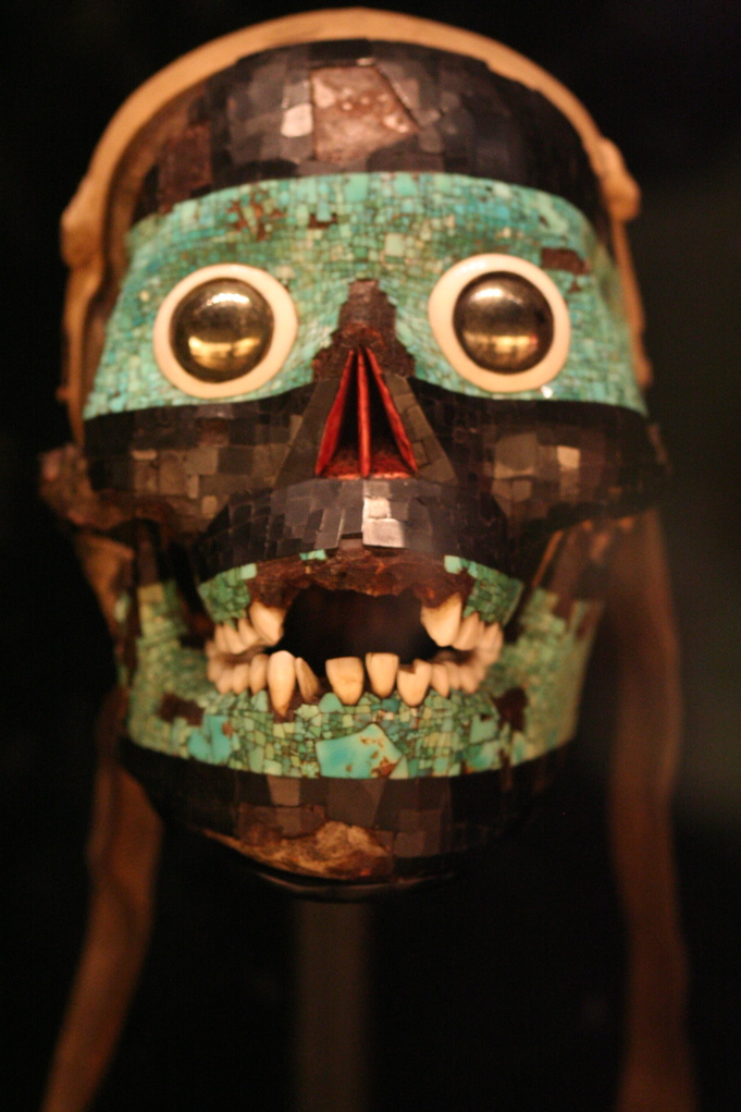 Tezcatlipoca.